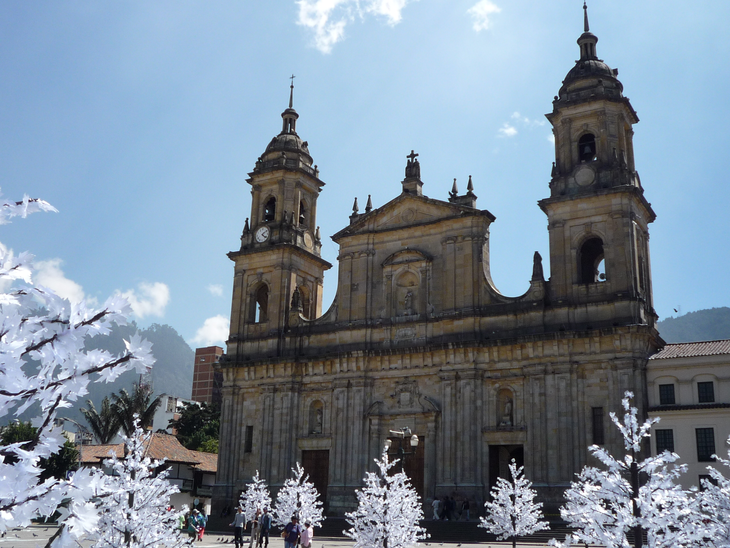 Catedral Primada de Colombia, Bogotá